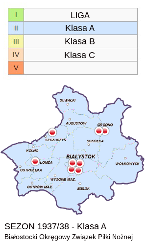 Jagiellonia w sezonie 1937/38 - mapa